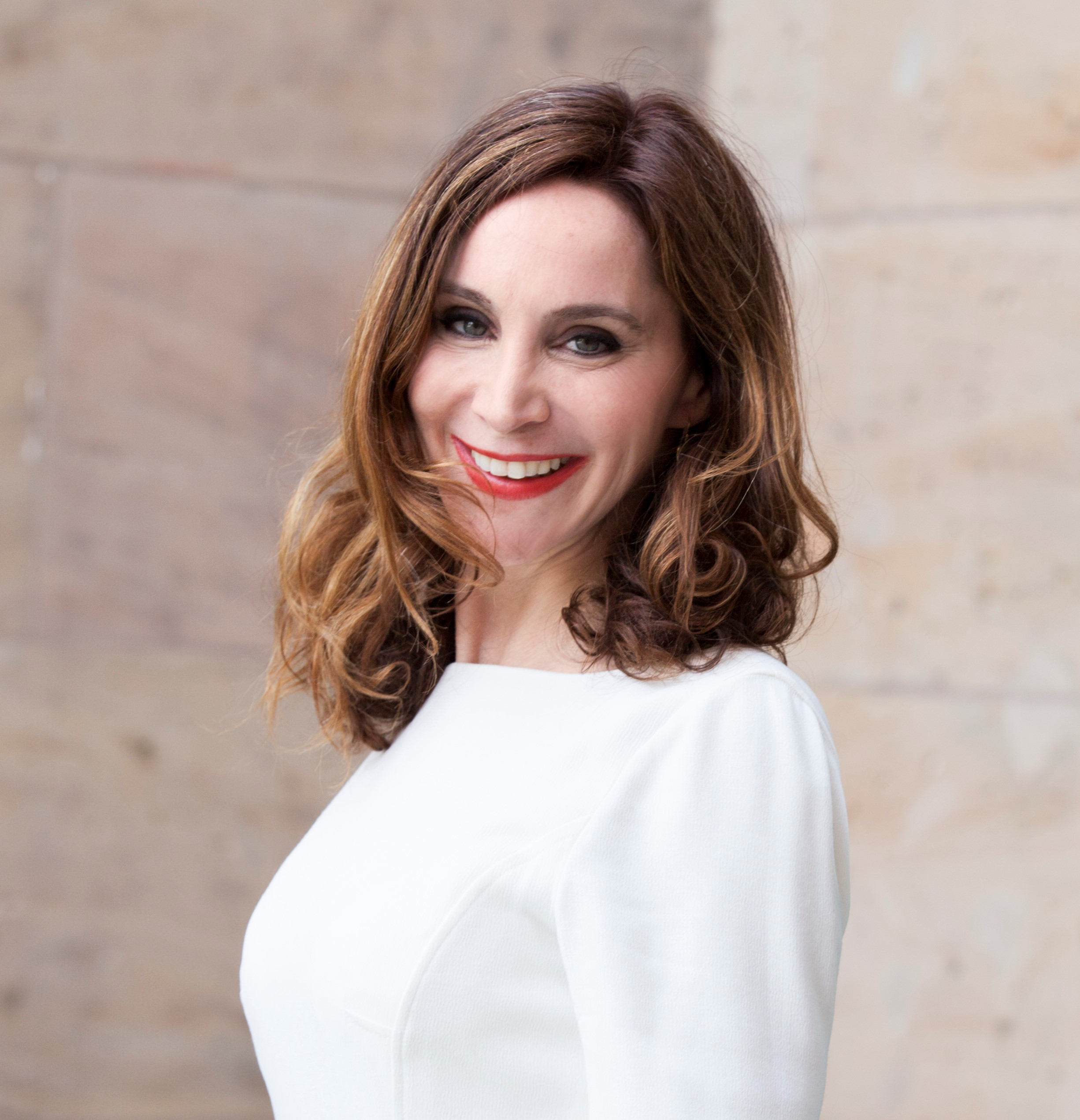 Porträt Anabel Ternès